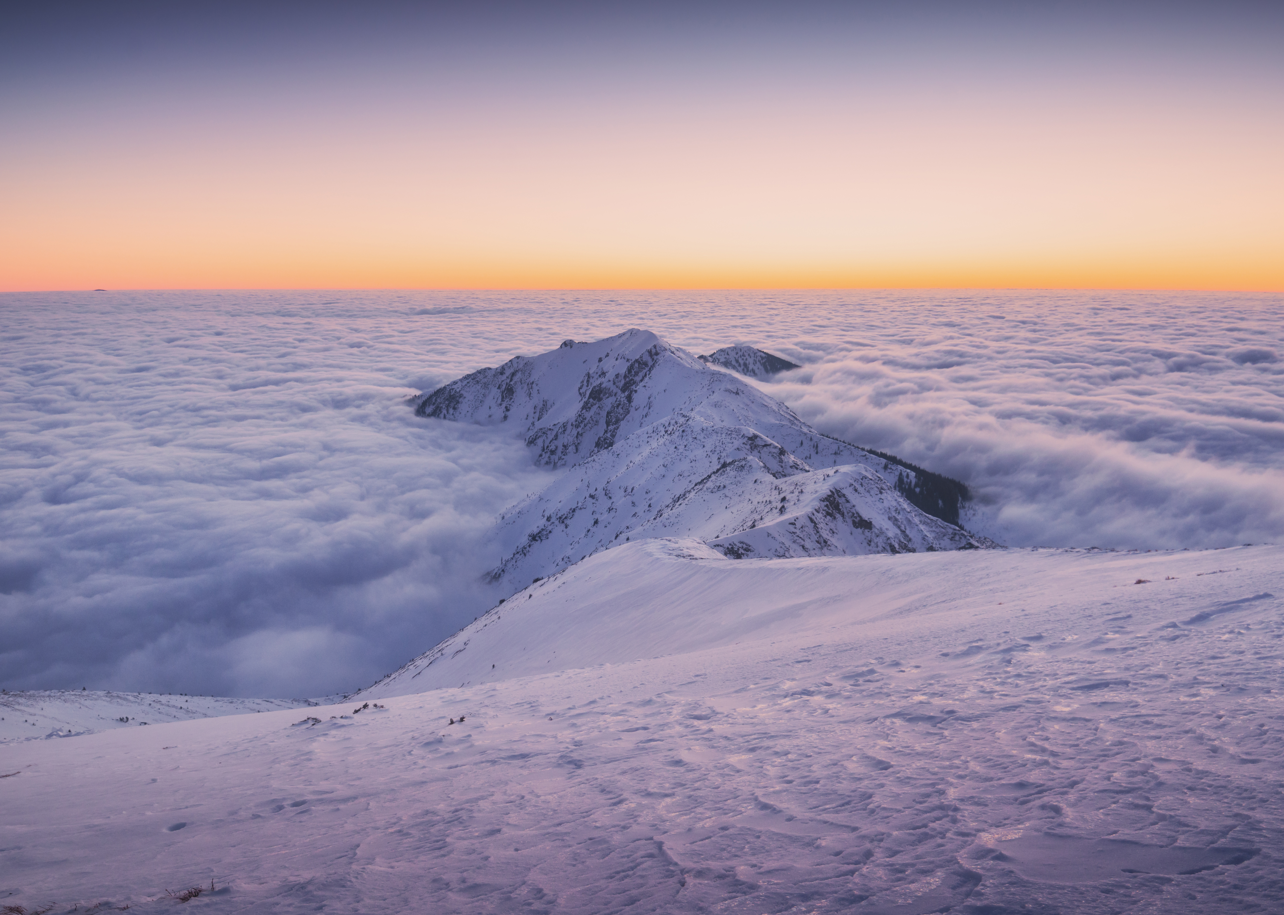 Карпатський біосферний заповідник, Рахівський, Тячівський, Хустський, Виноградівський райони